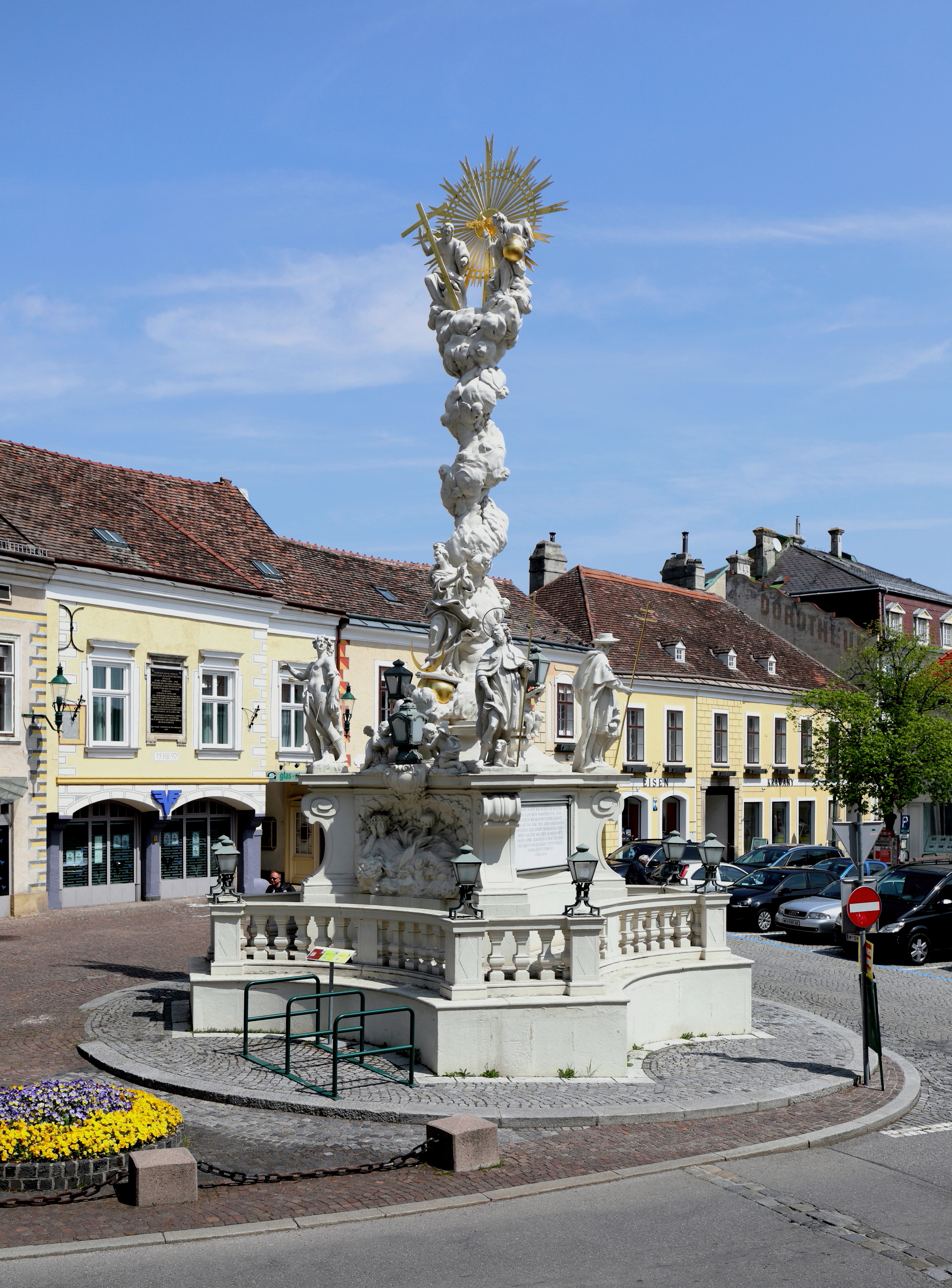 Die Pest- bzw. Dreifaltigkeitssäule am Freiheitsplatz in der niederösterreichischen Bezirkshauptstadt Mödling.Sie wurde aus Dankbarkeit für die „Erlösung aus schrecklicher Bedrohung“ nach mehreren Pestepidemien errichtet. Die Grundsteinlegung erfolgte durch Kaiser Karl VI. am 21. Mai 1714. Dargestellt sind an den vier Eckpunkten die Heiligen Sebastian mit Pfeilen, Rochus mit Hund, Karl sowie Franz Xaver und in einer Nische an der Westseite ist die heilige Rosalia liegend dargestellt.